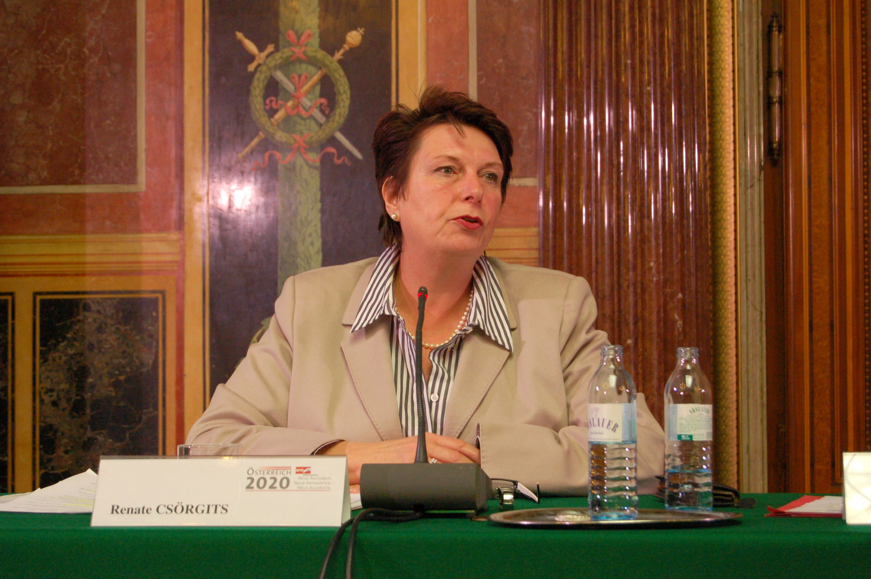 Diskussionsveranstaltung "Der Sozialstaat im 21. Jh. - Vision oder Utopie?" vom 18.3.2010 Copyright SPÖ Klub